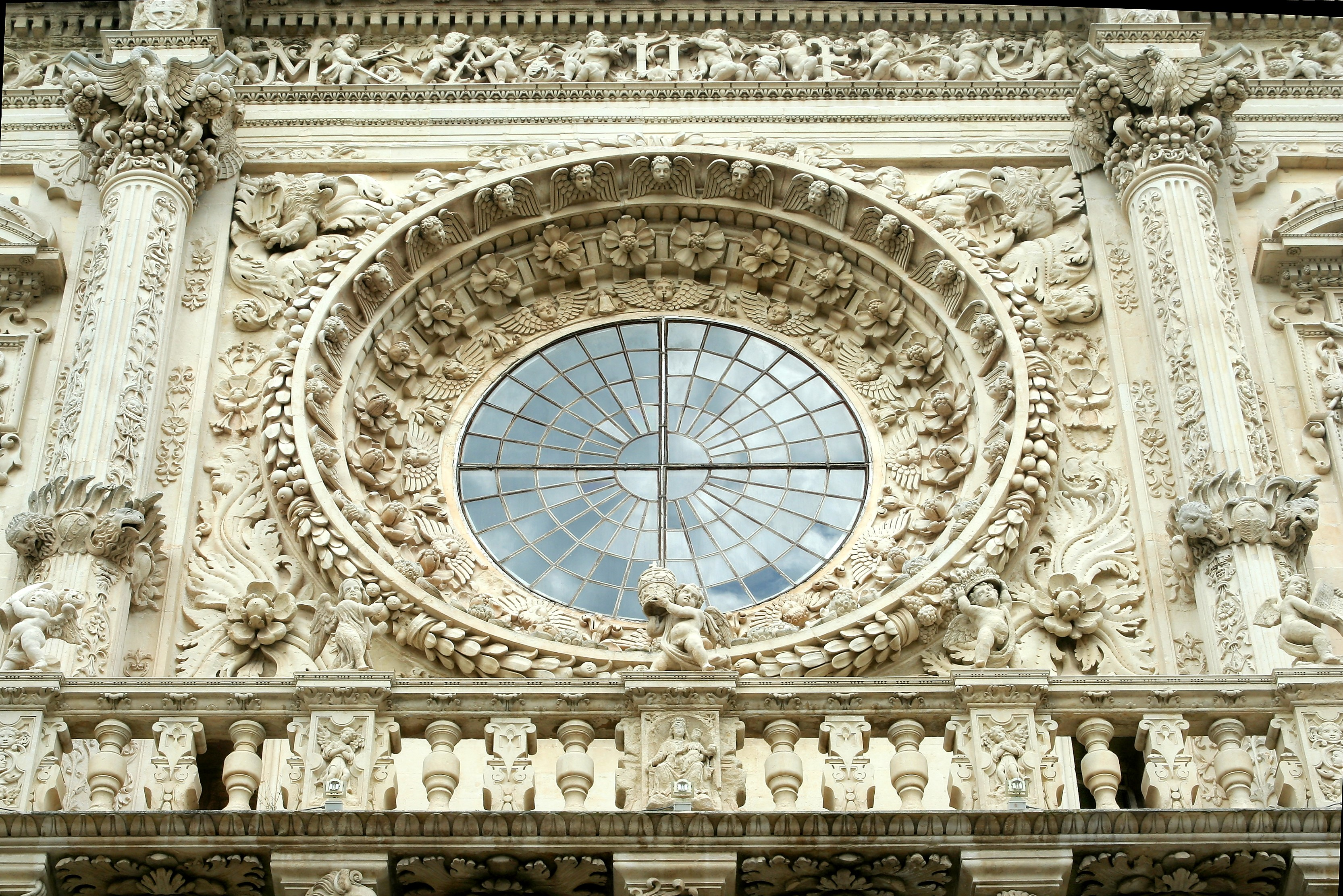 Rosace de la façade.